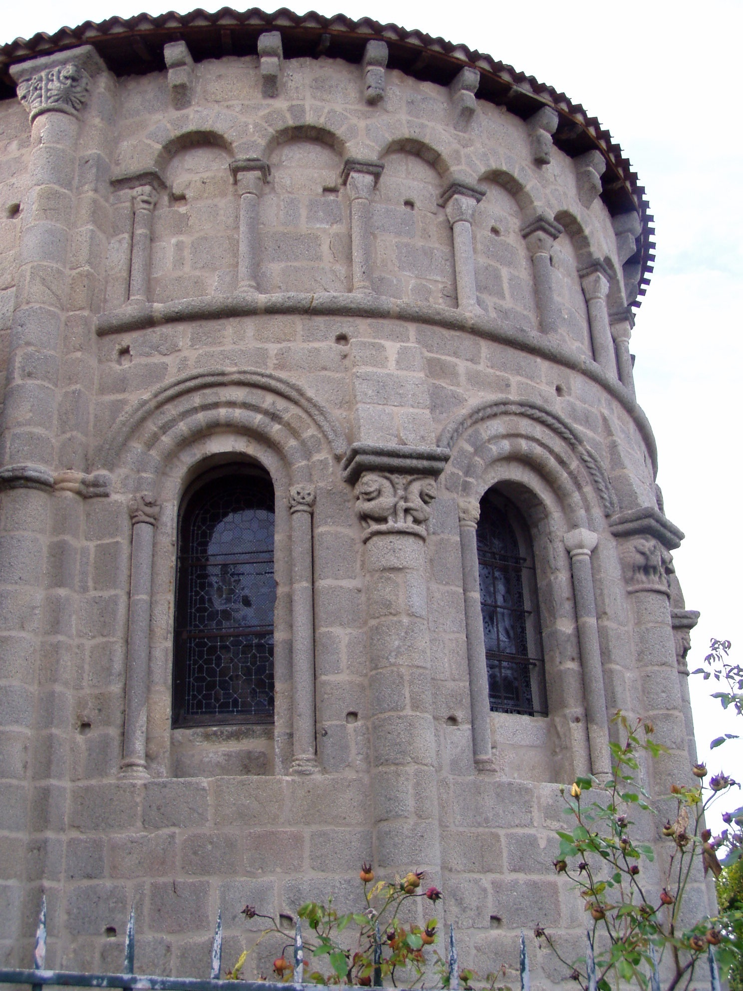 église d'Ahun chevet photo personnelle de Françoise Thurion alias Accrochoc prise en septembre fr:2004 avec un appareil photo numérique Olympus Camedia C725